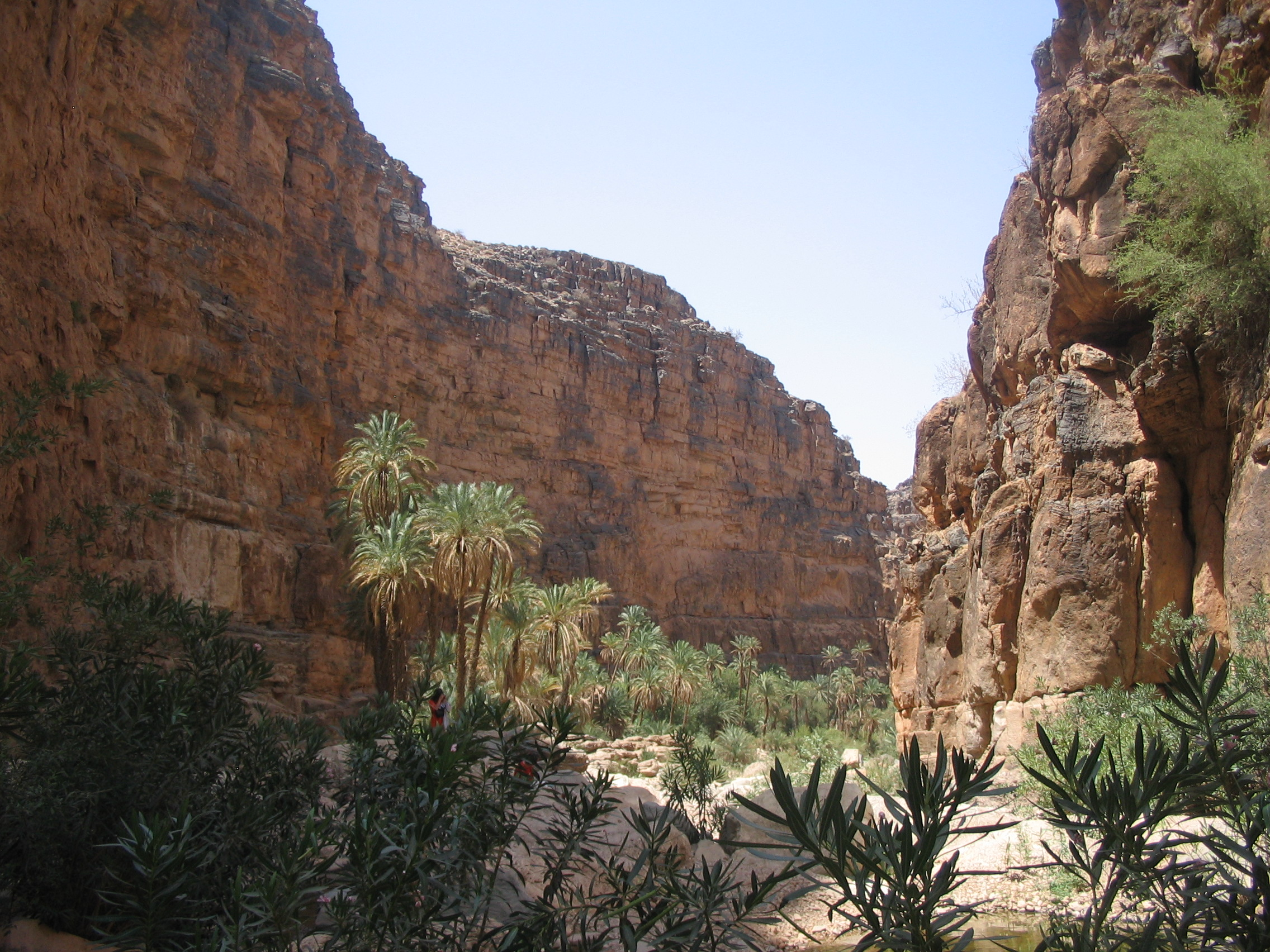 Gueltas et gorges à Amtoudi,Maroc